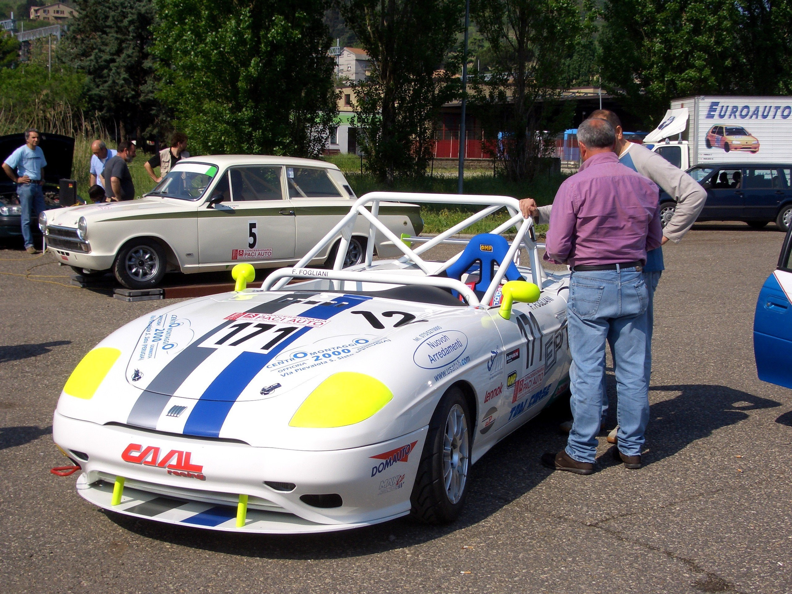 Una Fiat Barchetta da competizione. Foto scattata da me alle verifiche della Cronoscalata della Castellana (Orvieto) il 21.4.07.